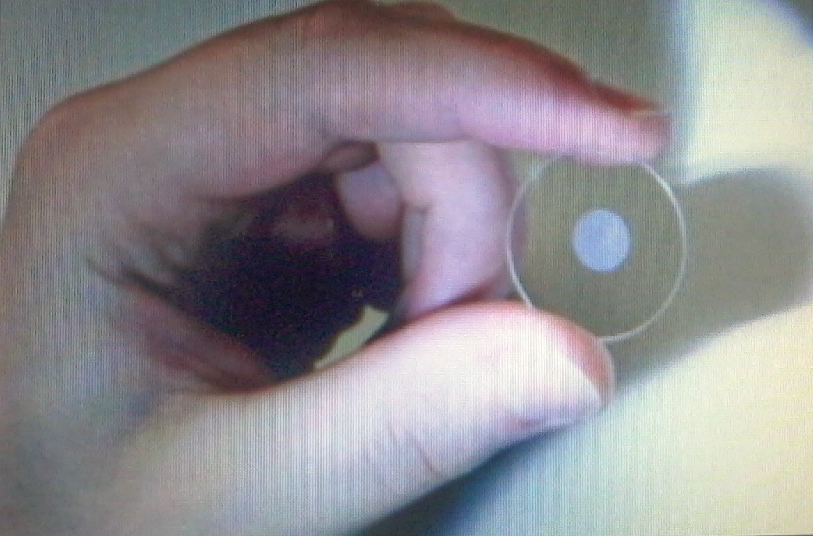 Знято мобілкою Самсунг